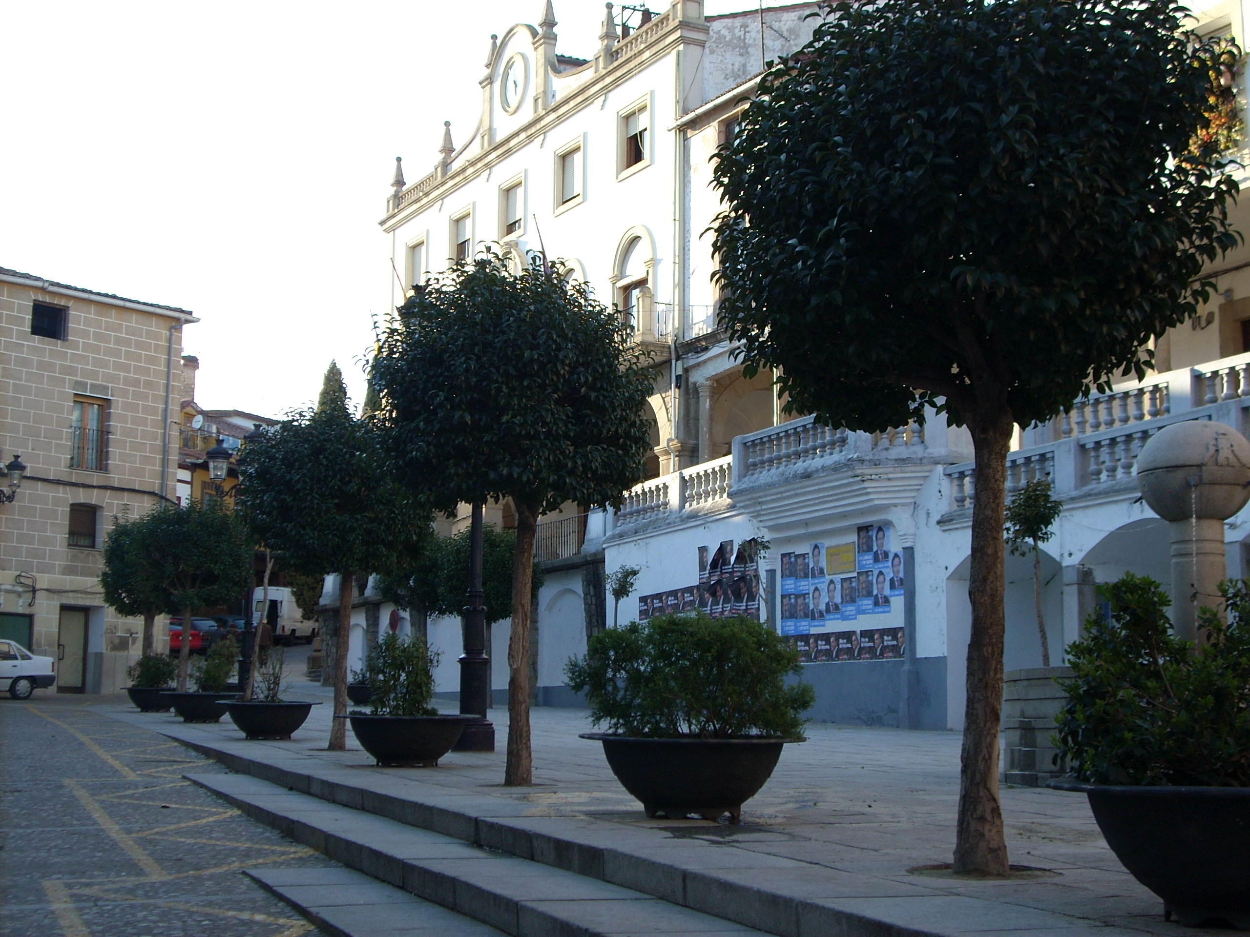 Plaza Mayor de Jaraíz de la Vera